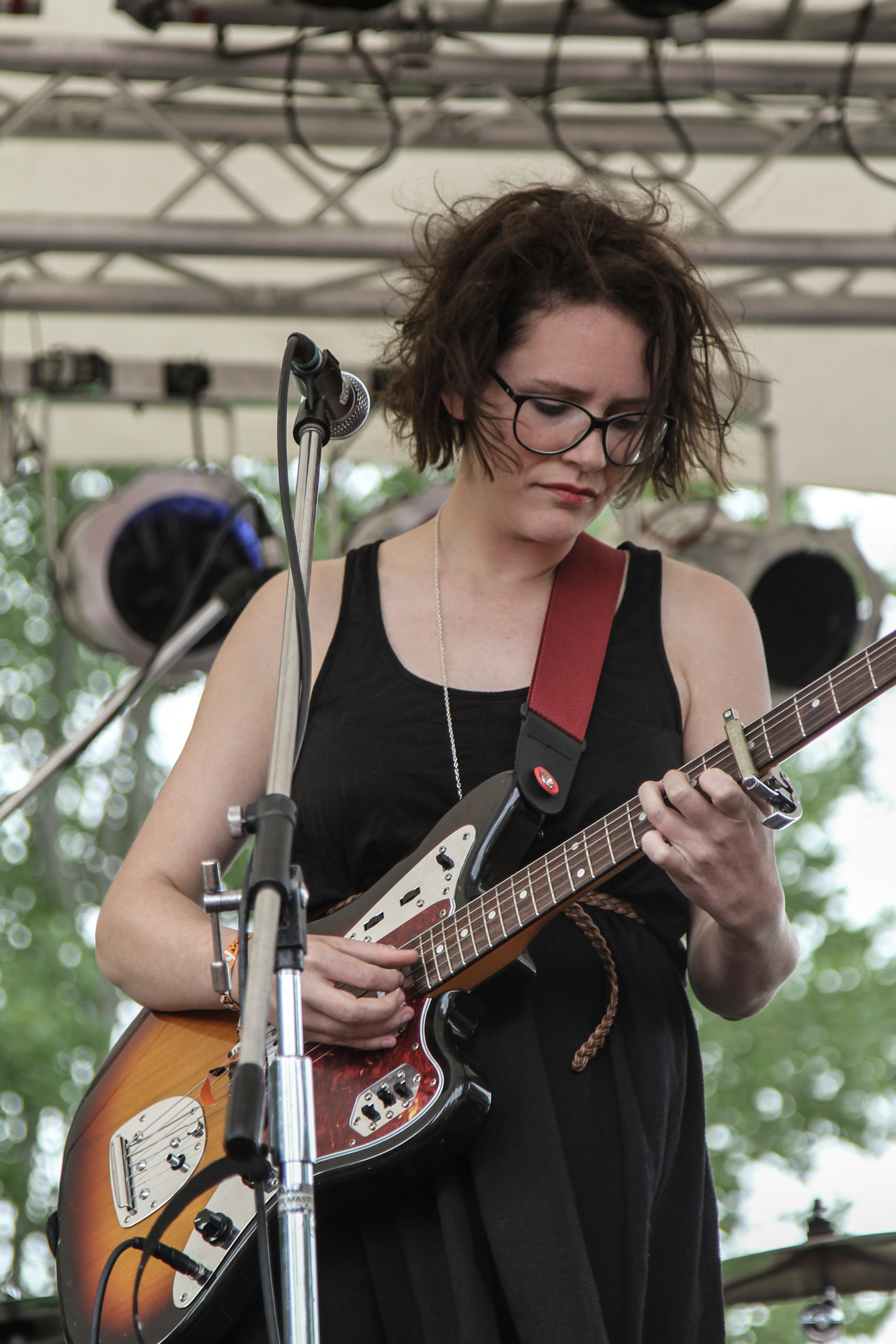 Soley за игрой